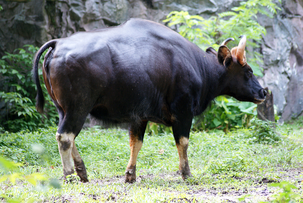 Zoo Negara, Malaysia